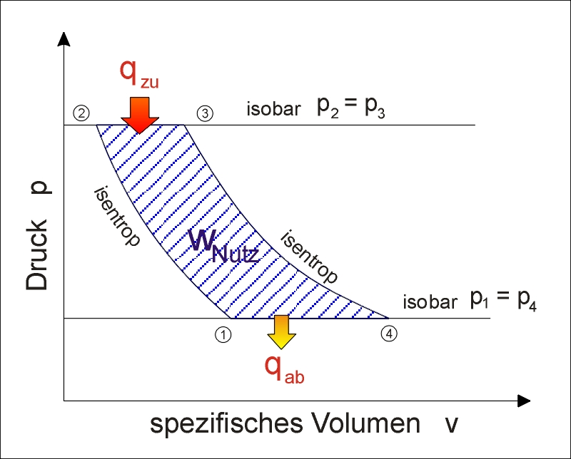 Selbst erstellt mit Corell-draw von Seldon11 am 21.09.2006 Darstellung des idealen Joule- oder auch Gasturbinenprozesses im p-v-Diagramm (Tafelbild einer Thermodynamikvorlesung)